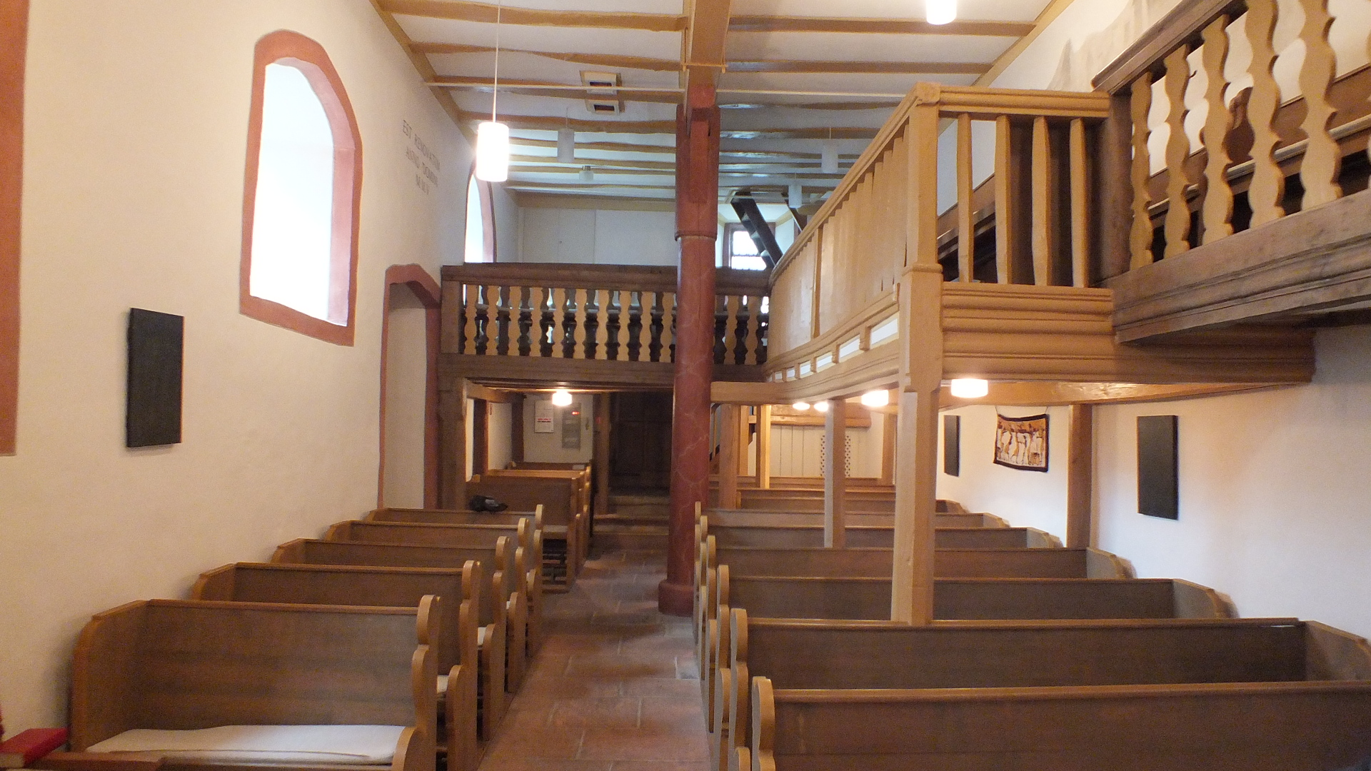 Evangelische Kirche Launsbach, Gemeinde Wettenberg, Landkreis Gießen, Hessen, Deutschland